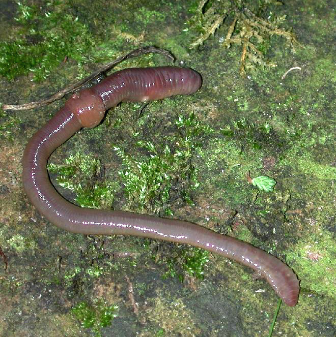 Regenwurm mit Clitellum - (sattelförmige Verdickung im vorderen Drittel).Das Sekret der Clitellum-Drüsen dient u. a. zur Bildung dieses Ei-Kokons.